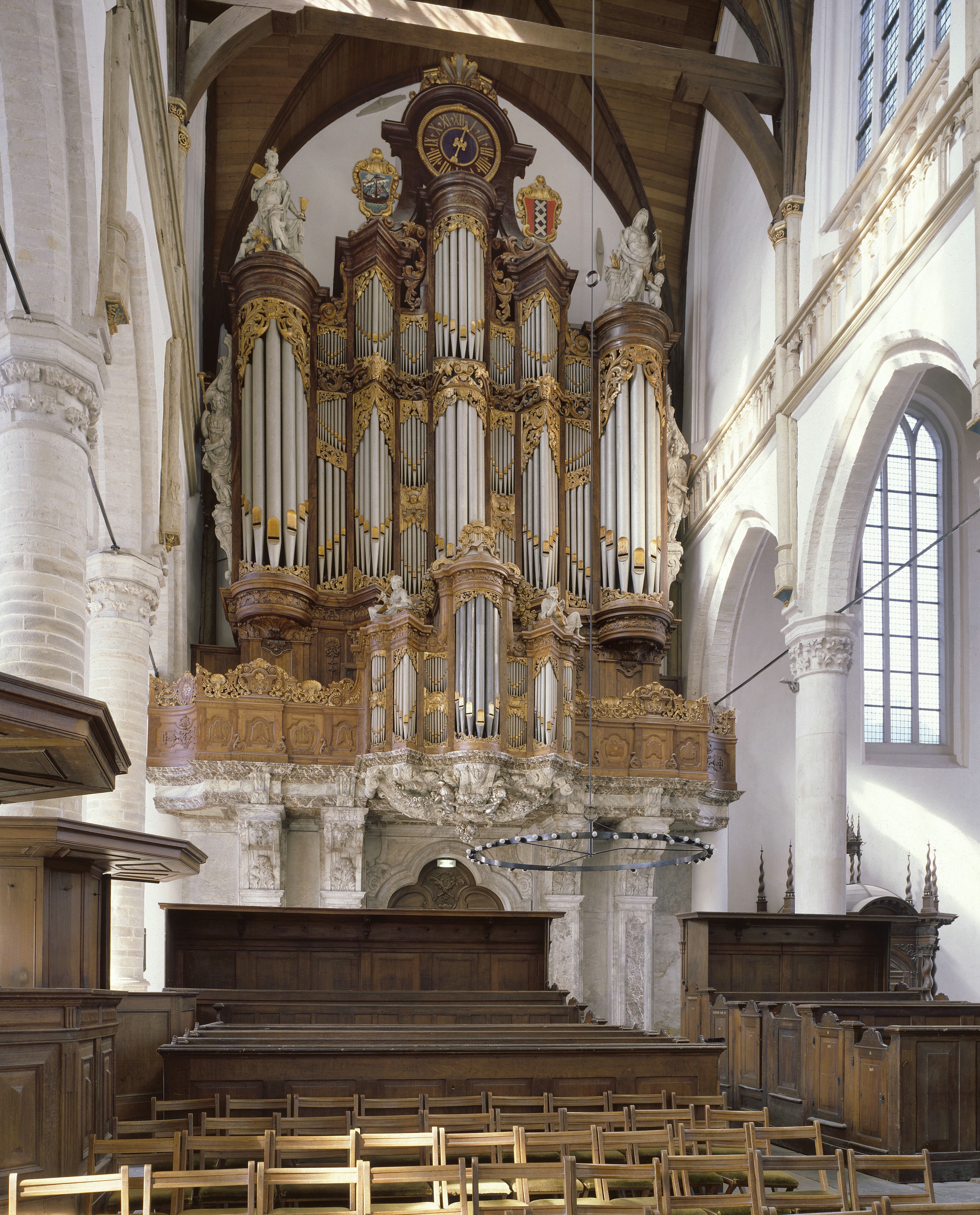 Oude Kerk: Interieur, aanzicht orgel, orgelnummer 70 (opmerking: Gefotografeerd voor Het Historische Orgel in Nederland 1726-1769, bladzijde 32)